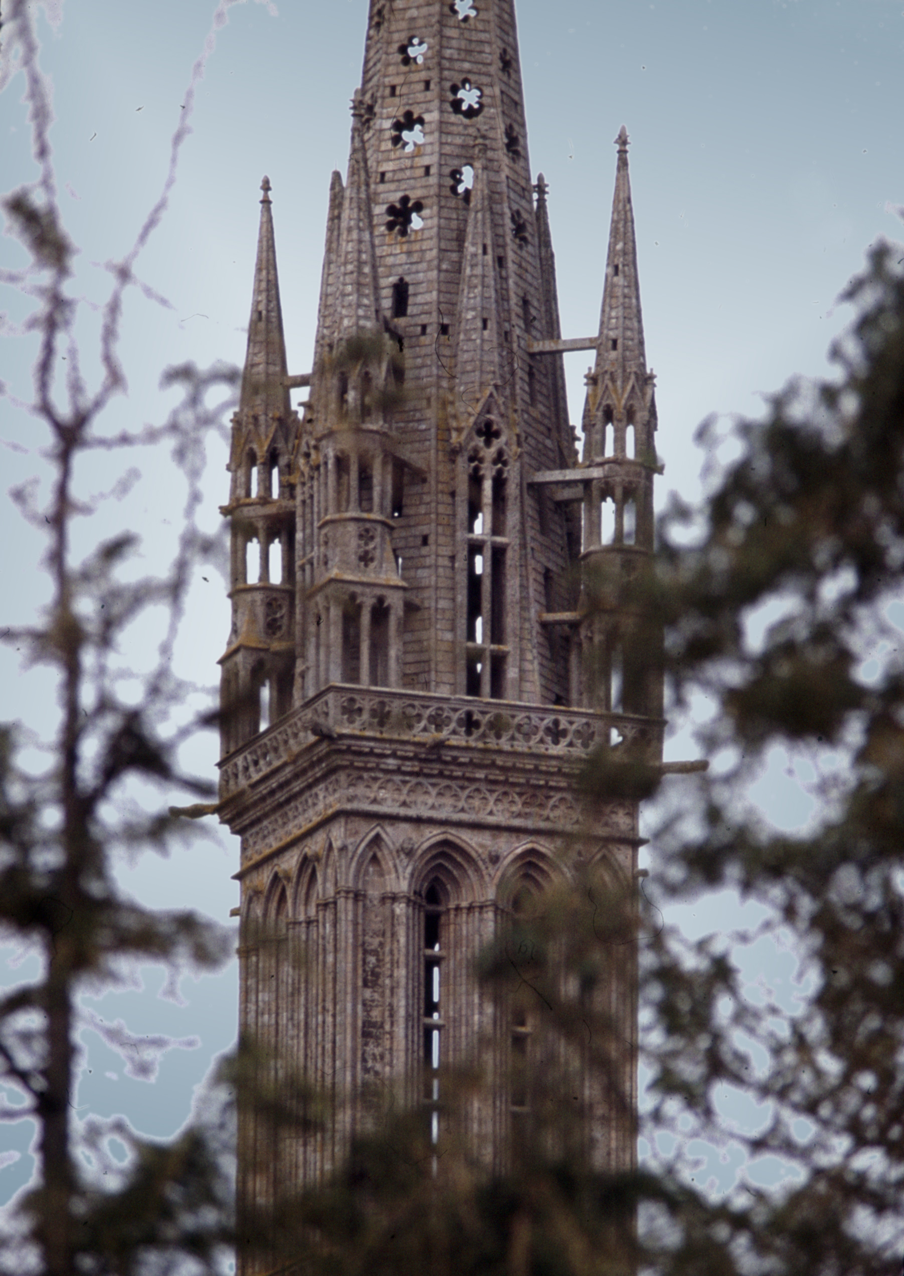 Saint-Pol-de-Léon